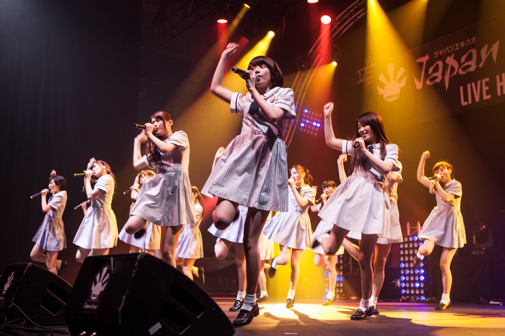 Nogizaka46